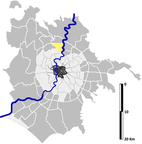 Grottarossa